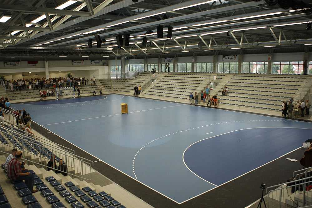 Maxipark Arena, Innenraum am Eröffnungstag